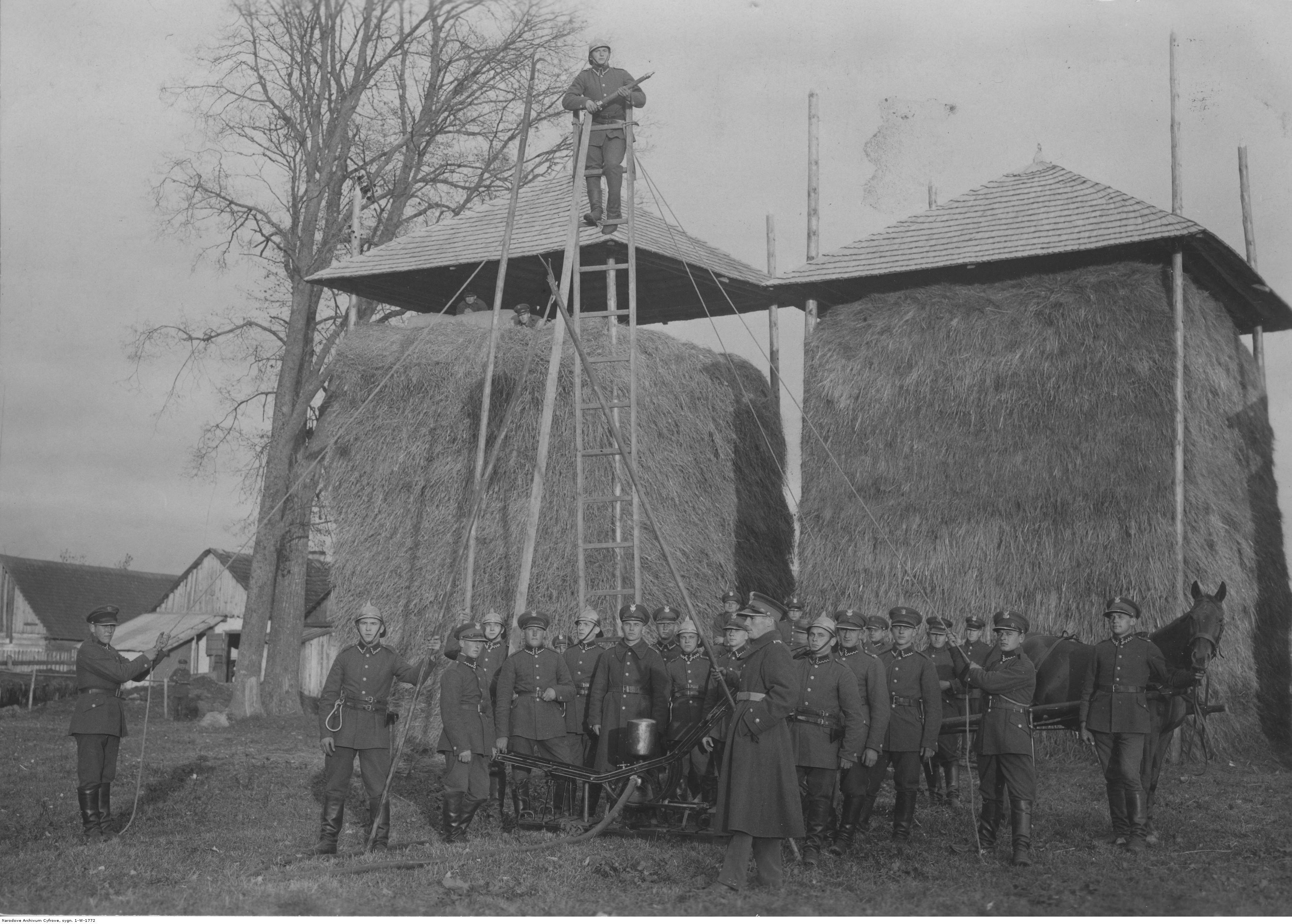 Straż pożarna Batalionu Korpusu Ochrony Pogranicza "Sejny". Koncern Ilustrowany Kurier Codzienny - Archiwum Ilustracji. Sygnatura: 1-W-1772